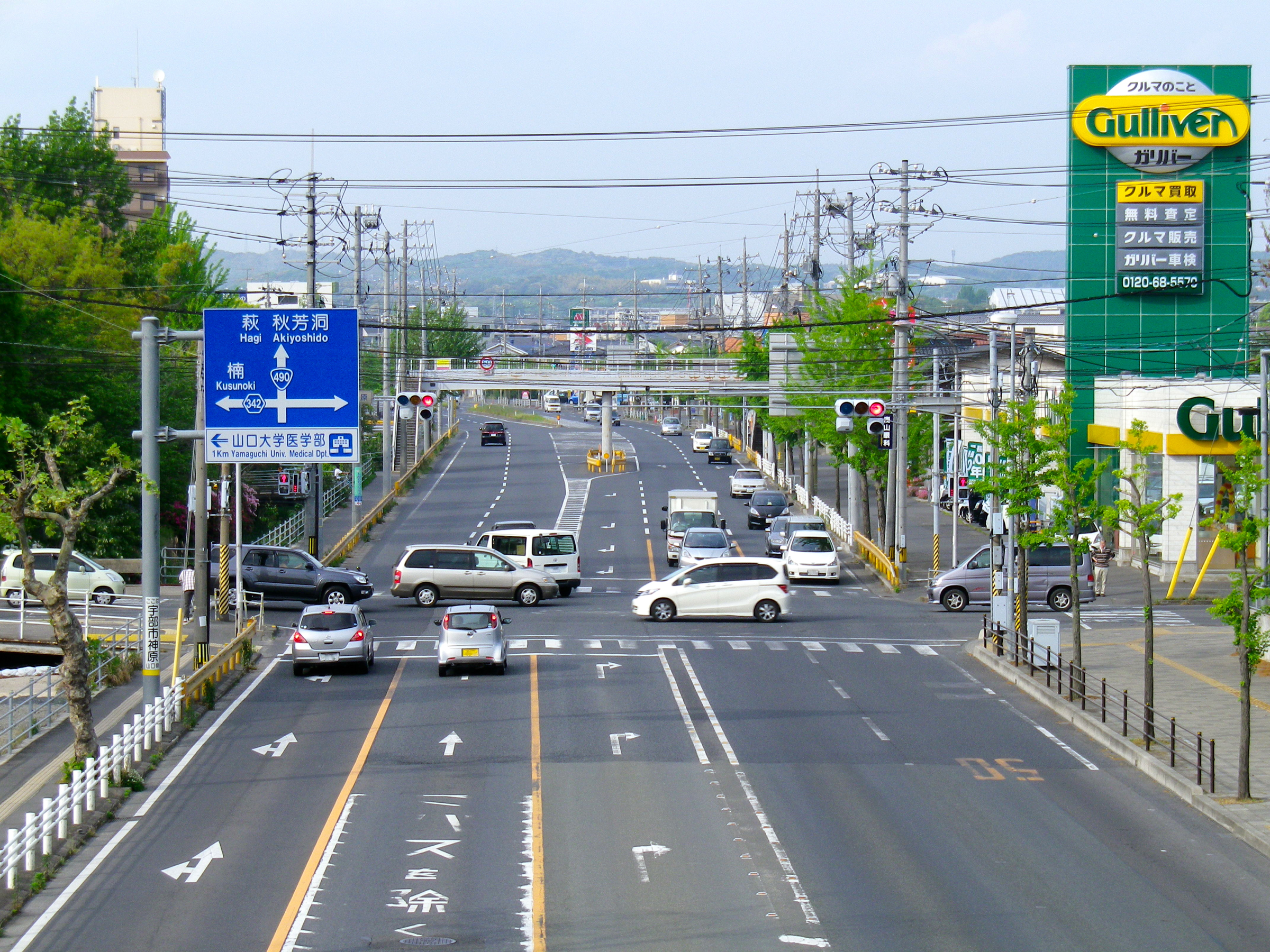 国道490号下り方面。山口家宇部市琴芝町付近。